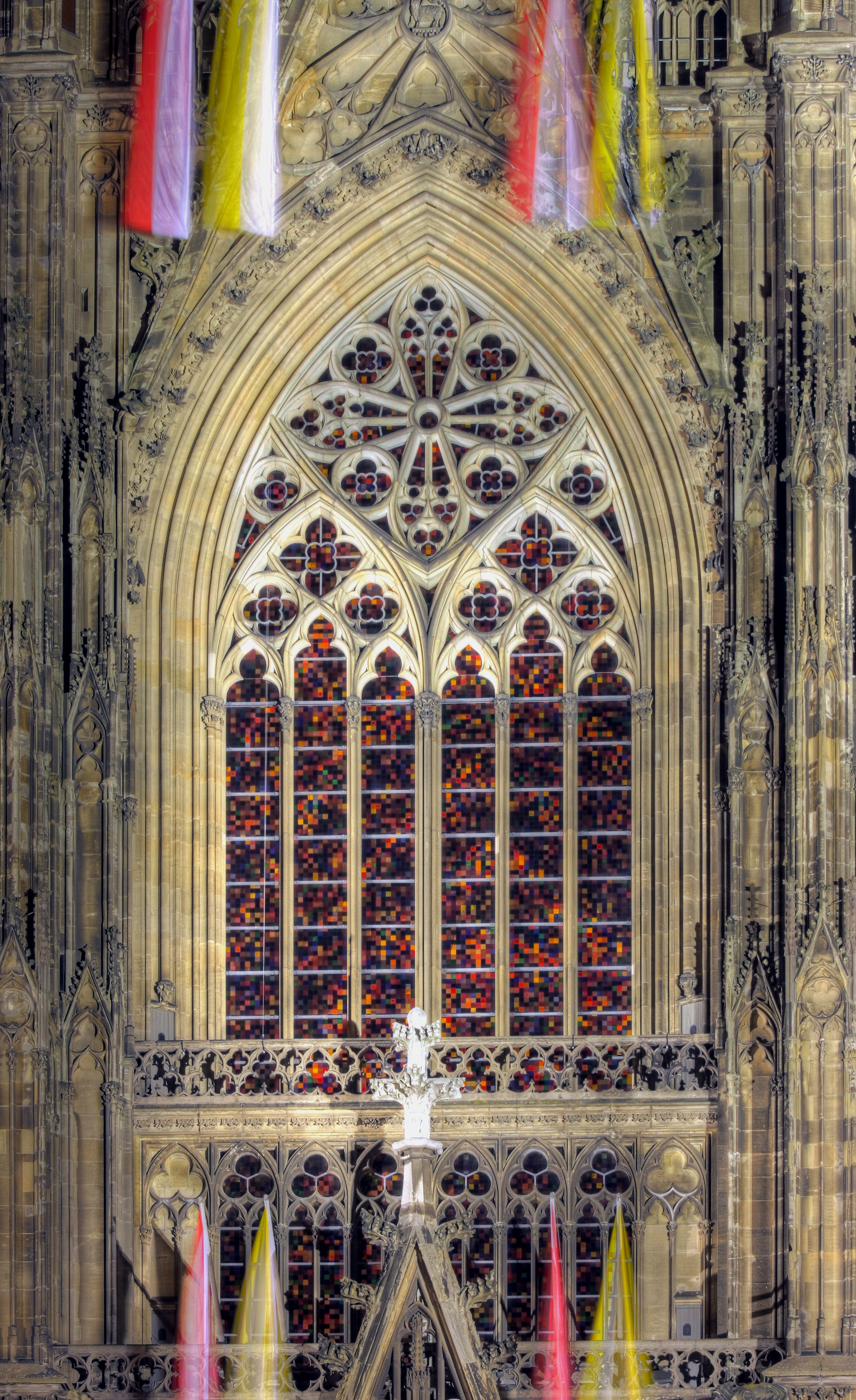 Kölner Dom. Richter-Fenster von aussen bei Nacht.